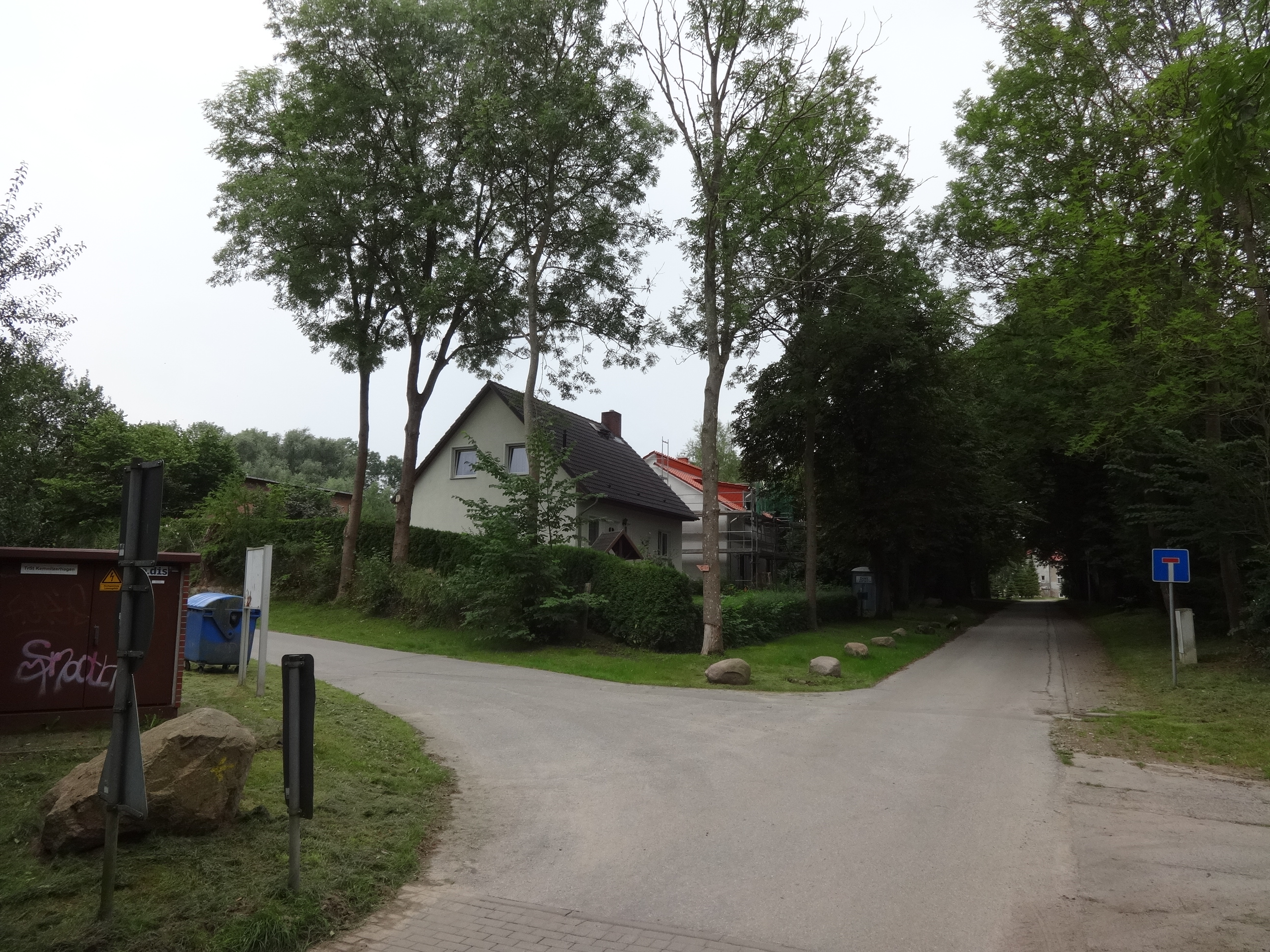 Kemitzerhagen, ein Ortsteil der Gemeinde Kemnitz bei Greifswald in Vorpommern-Greifswald, Mecklenburg-Vorpommern, aufgenommen vom Hanshäger Bach